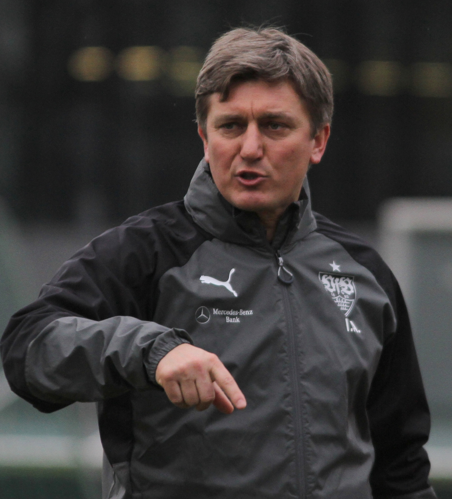 Ilija Aracic beim ersten Training als Co-Trainer des VfB 2018. Aufgenommen von